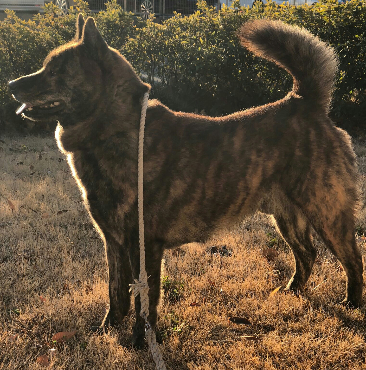 甲斐犬の成犬の横からのポートレート